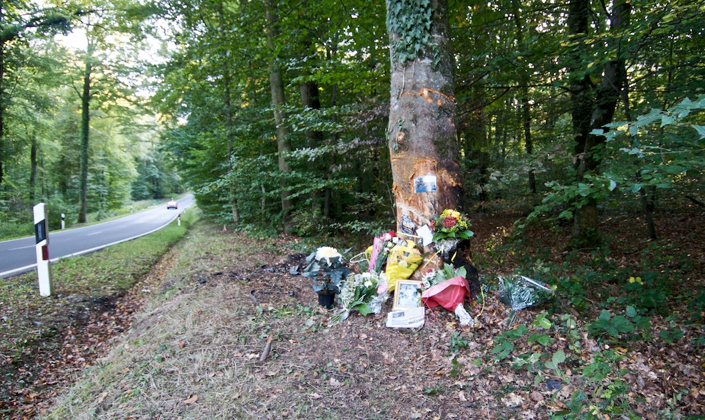 Traueraarbecht laanscht d'Strooss Mamer-Dippech no engem Accident am September 2009 mat engem Doudegen.